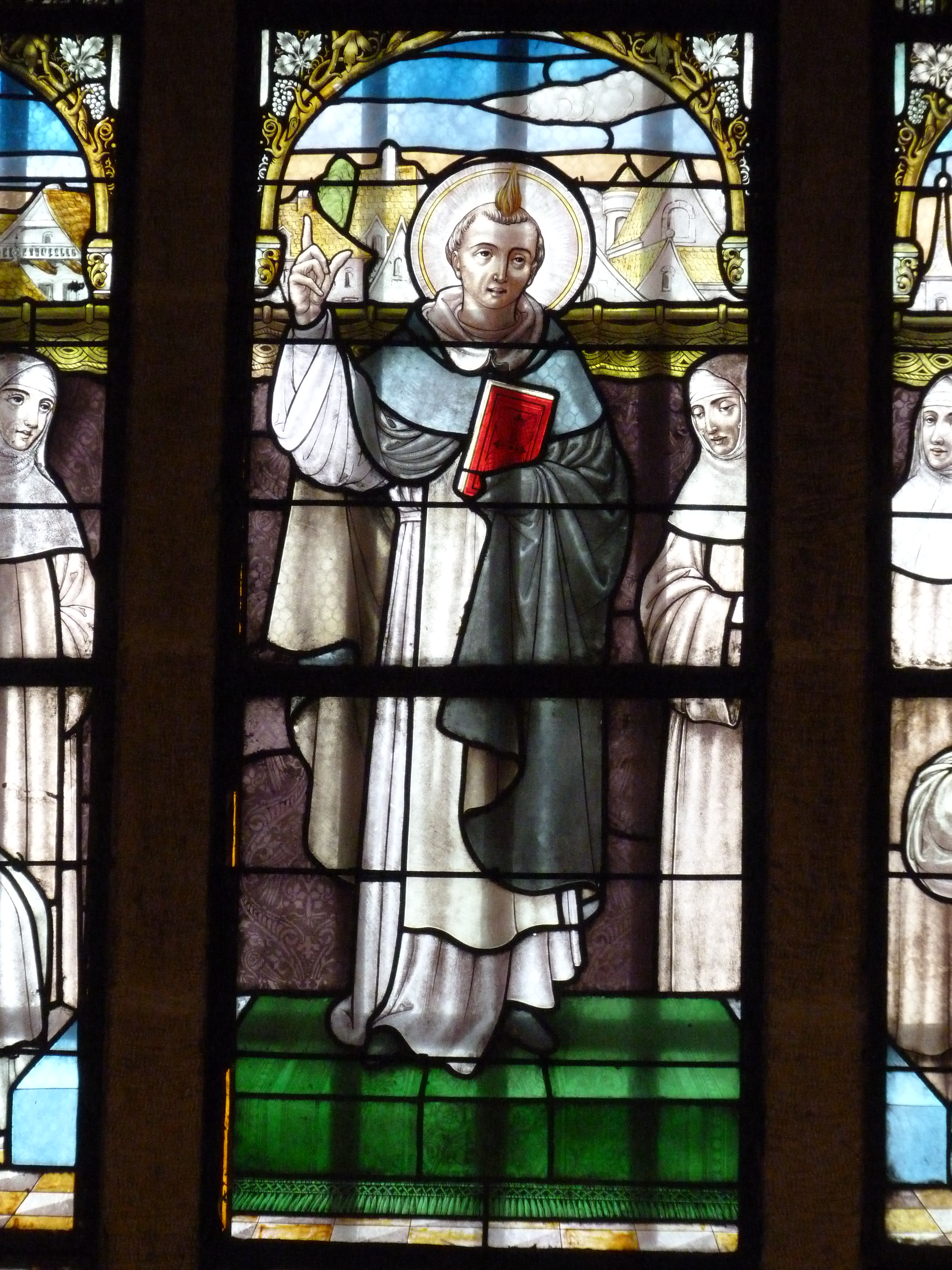 Visite de Saint Vincent Ferrier au monastère des dominicaines d'Estavayer-le-Lac (suisse) en 1404 - Vitrail Vitrail de Camille Ganton de Gant 1904.